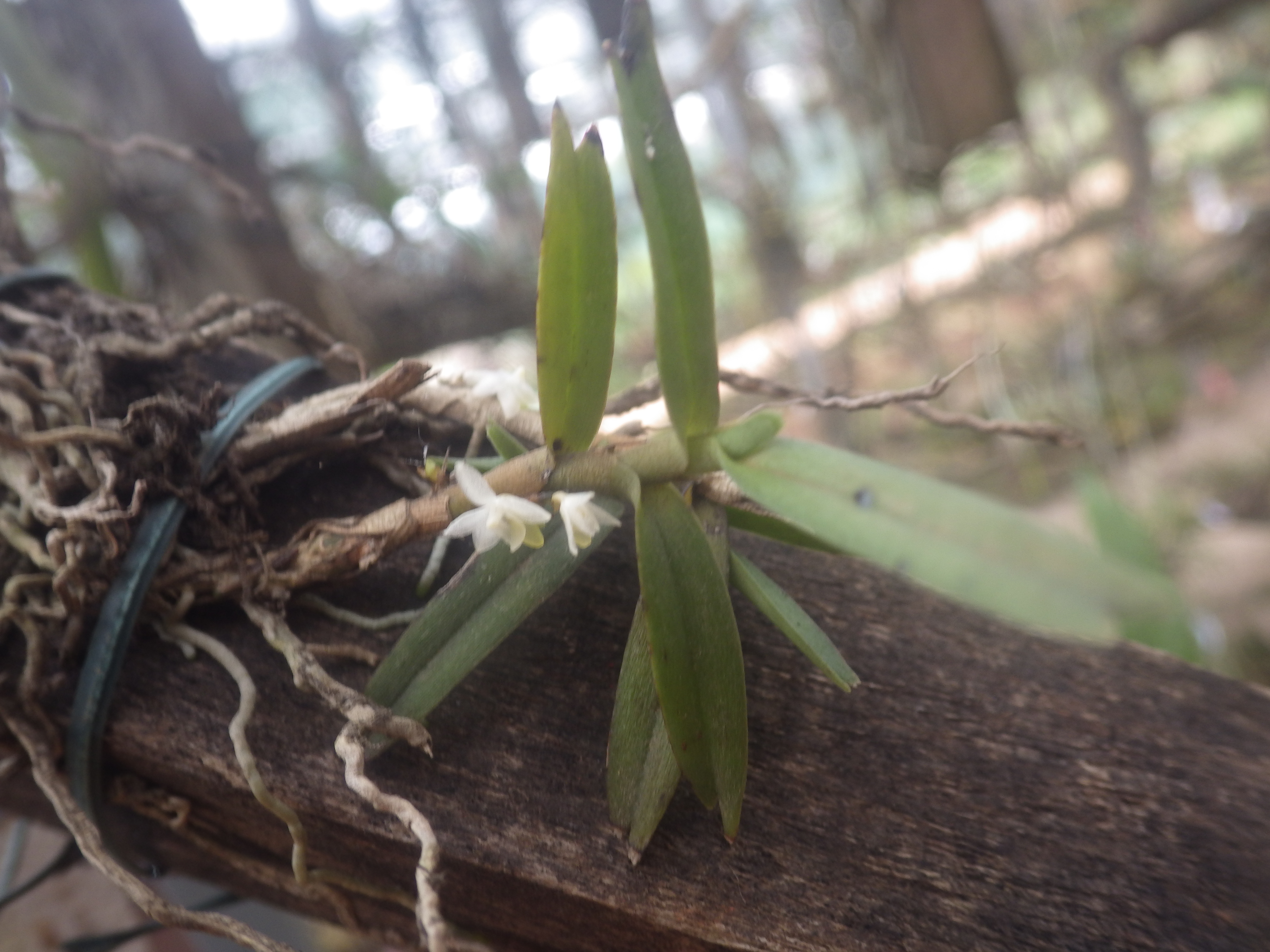 Herbe épiphyte appartenant à la famille des Orchidaceae